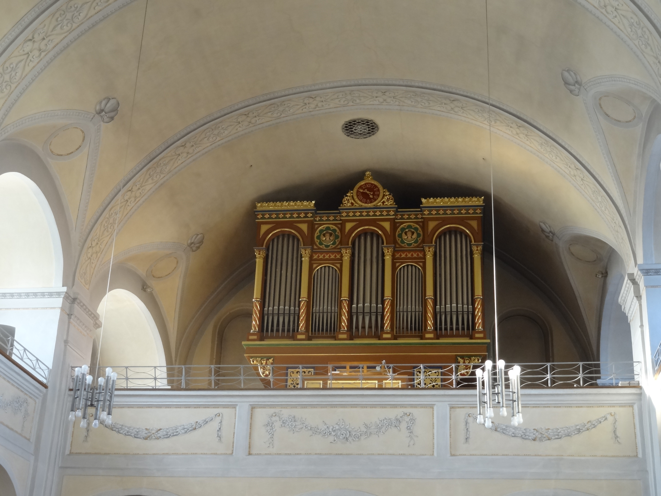 Orgel der Wallfahrtskirche Maria Hilf in Vilsbiburg